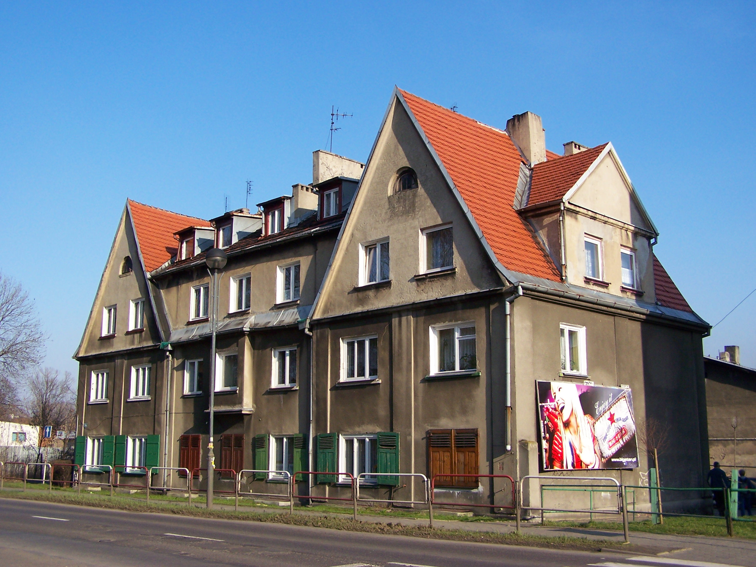 Budynek przy ul. Złotej w Katowicach.